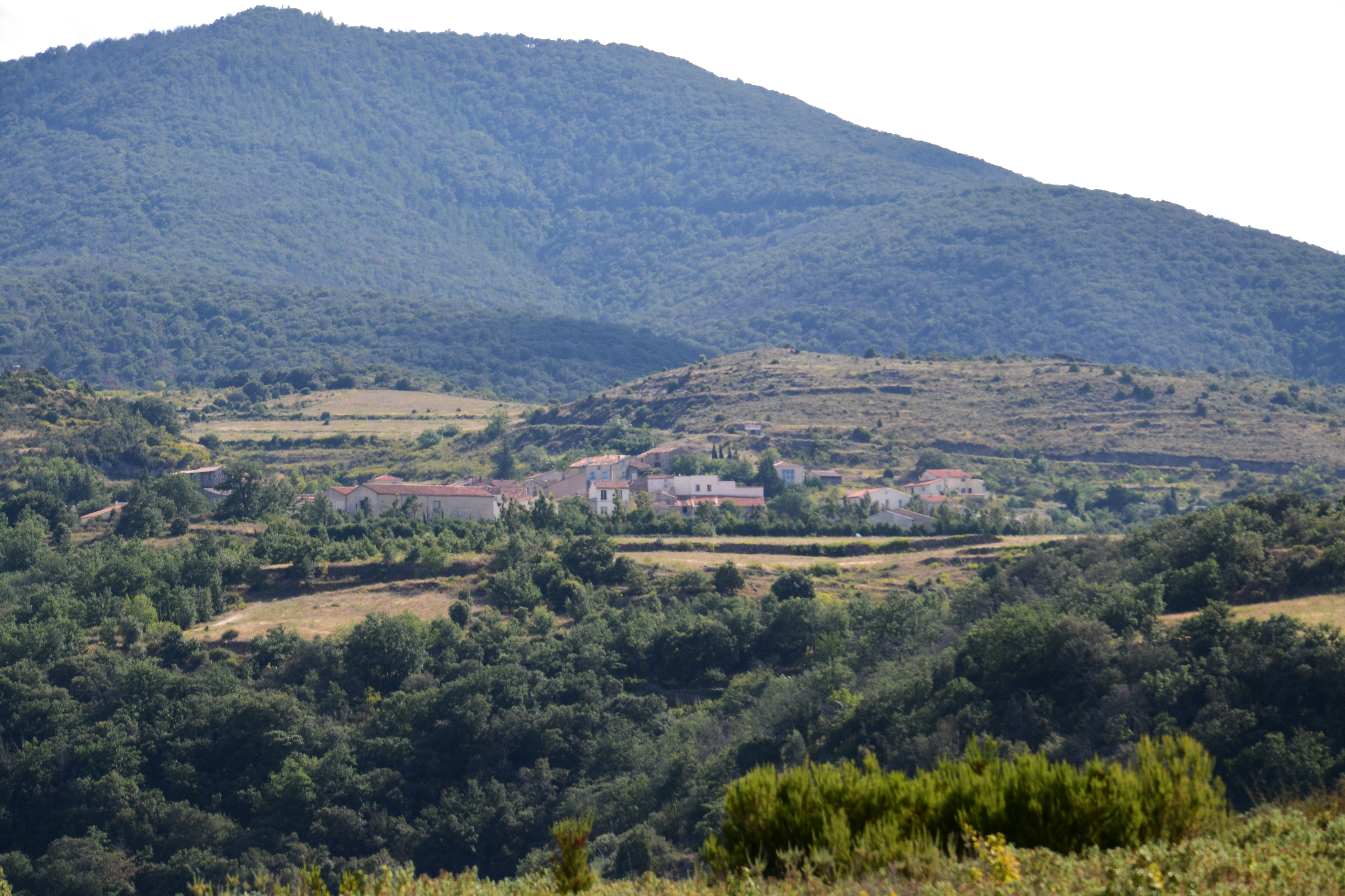 Vue du village de Trilla (Pyrénées-Orientales, France)